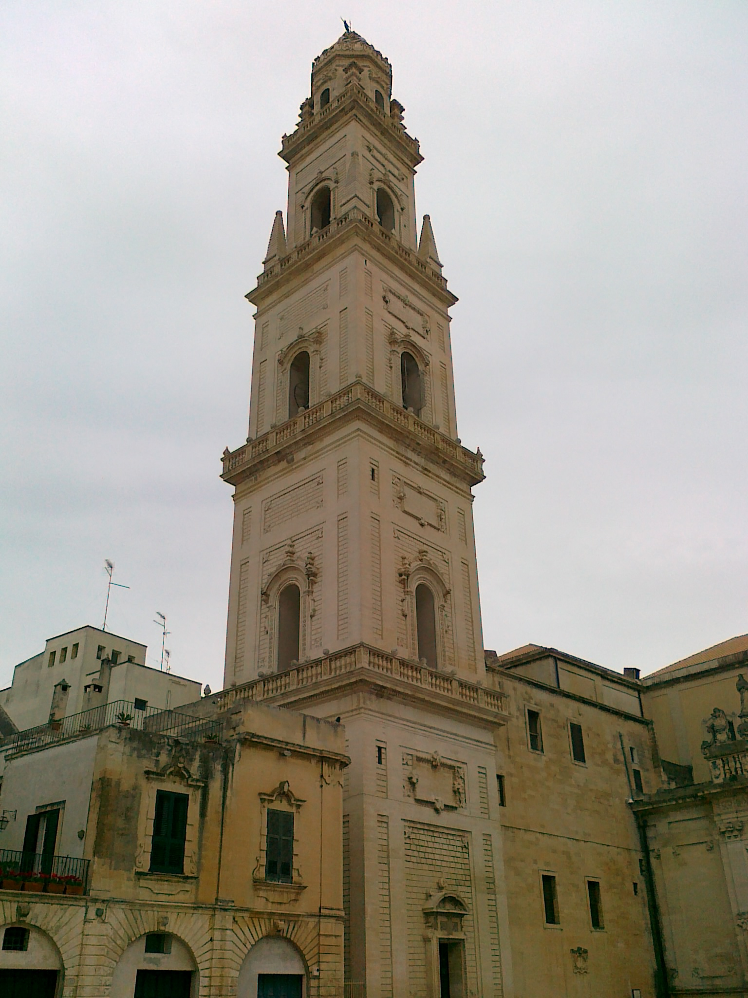 Il campanile del duomo a Lecce.